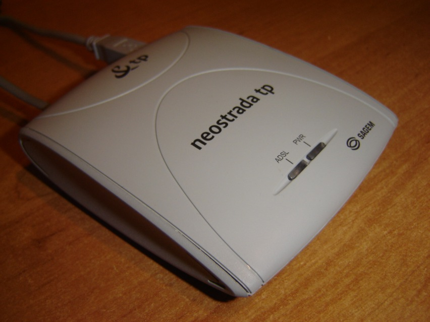 Sagem F@st 800 E2T - standardowy modem dołączany do Neostrady TP